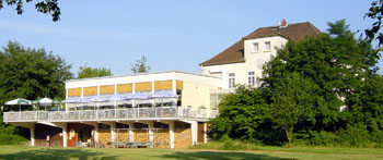 Bootshaus des Rüsselsheimer Ruder-Klubs 08